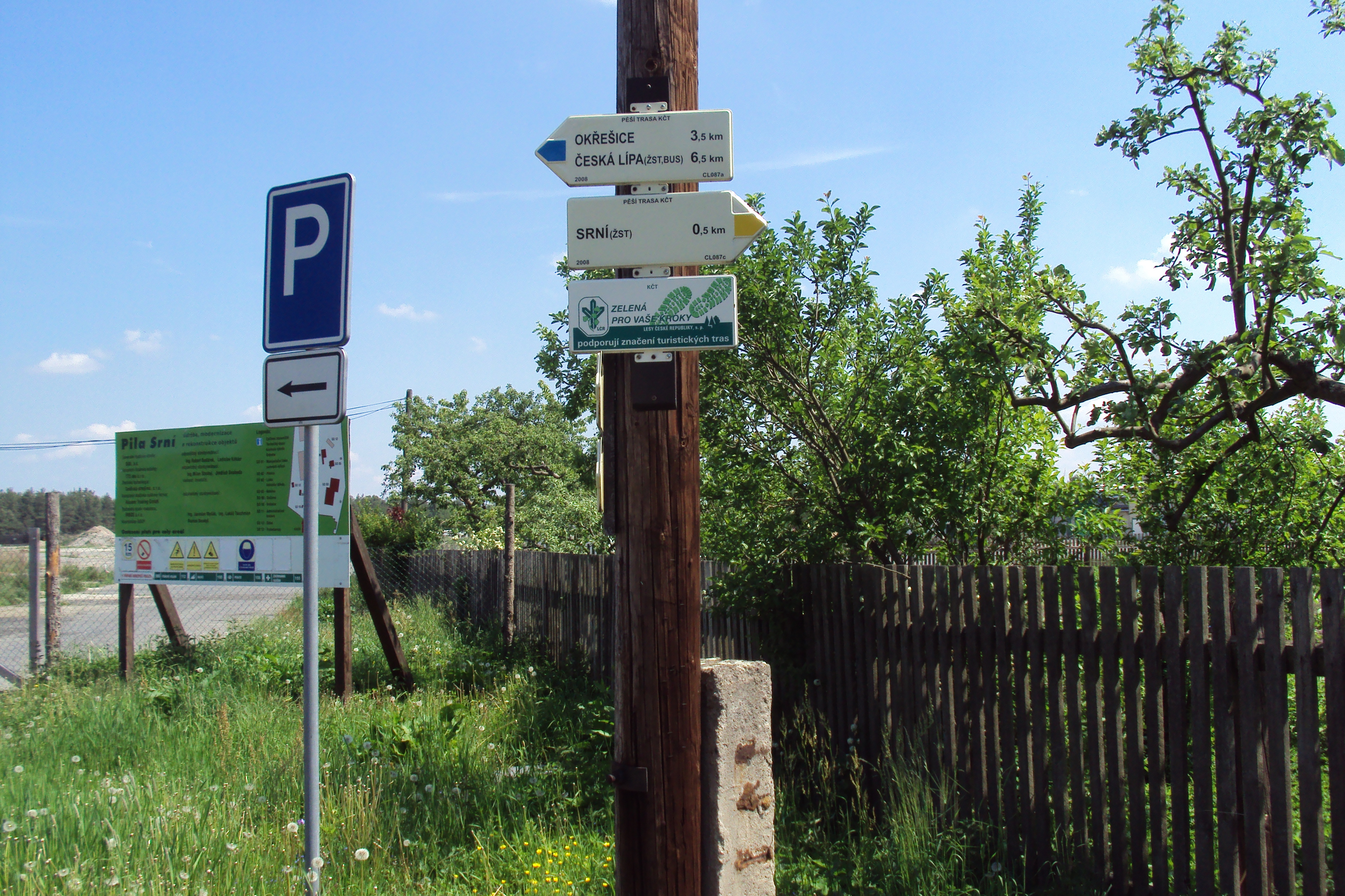 Turistický rozcestník (modrá, žlutá) v Srní u Provodína, u vchodu do pily